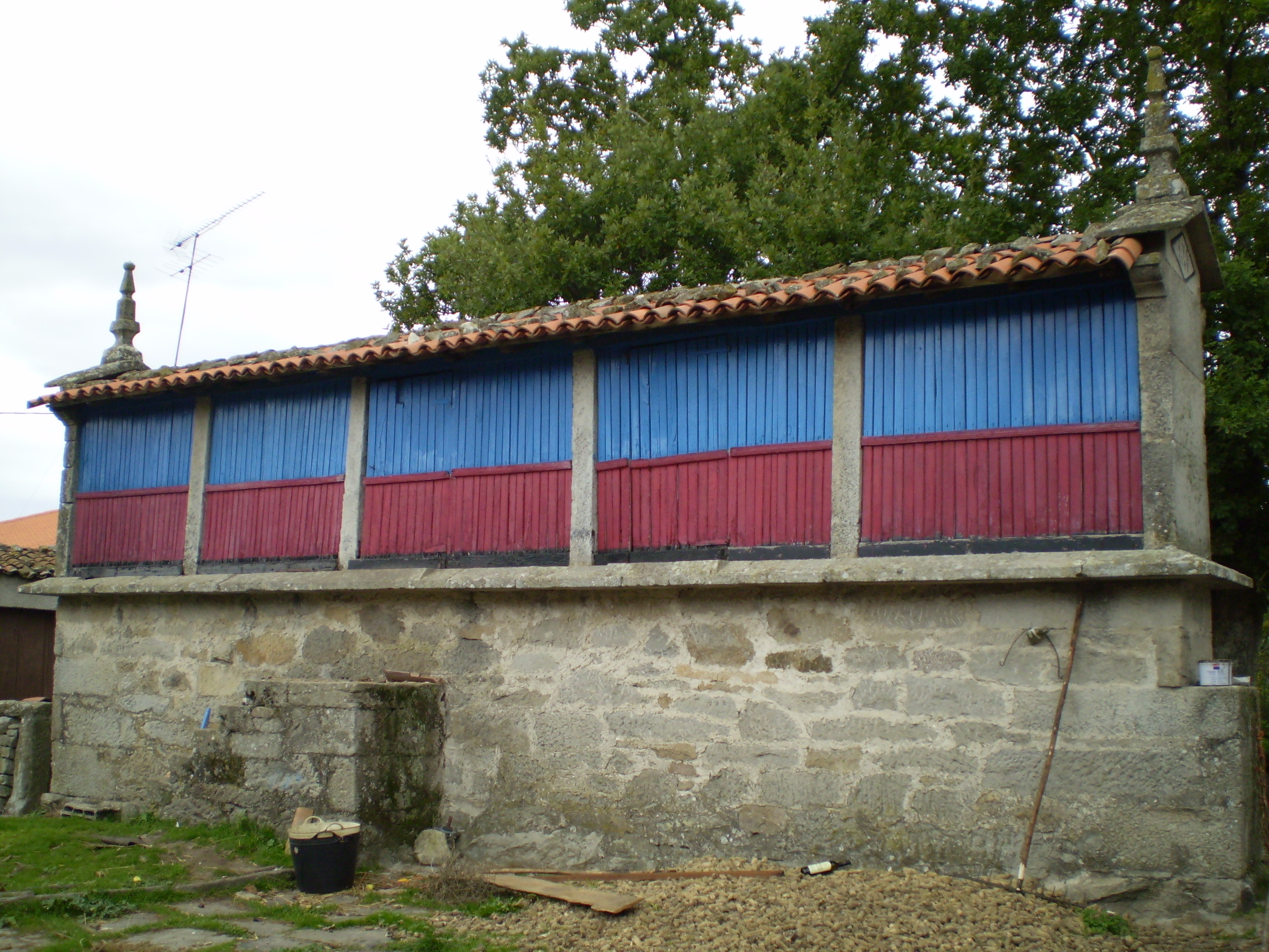 Hórreo de Outeiro de Donas (Antas de Ulla)